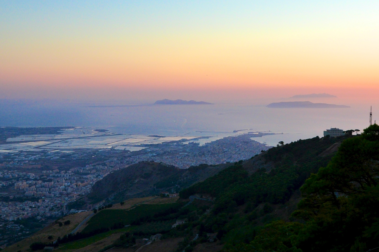 You can see Trapani & Favignana!